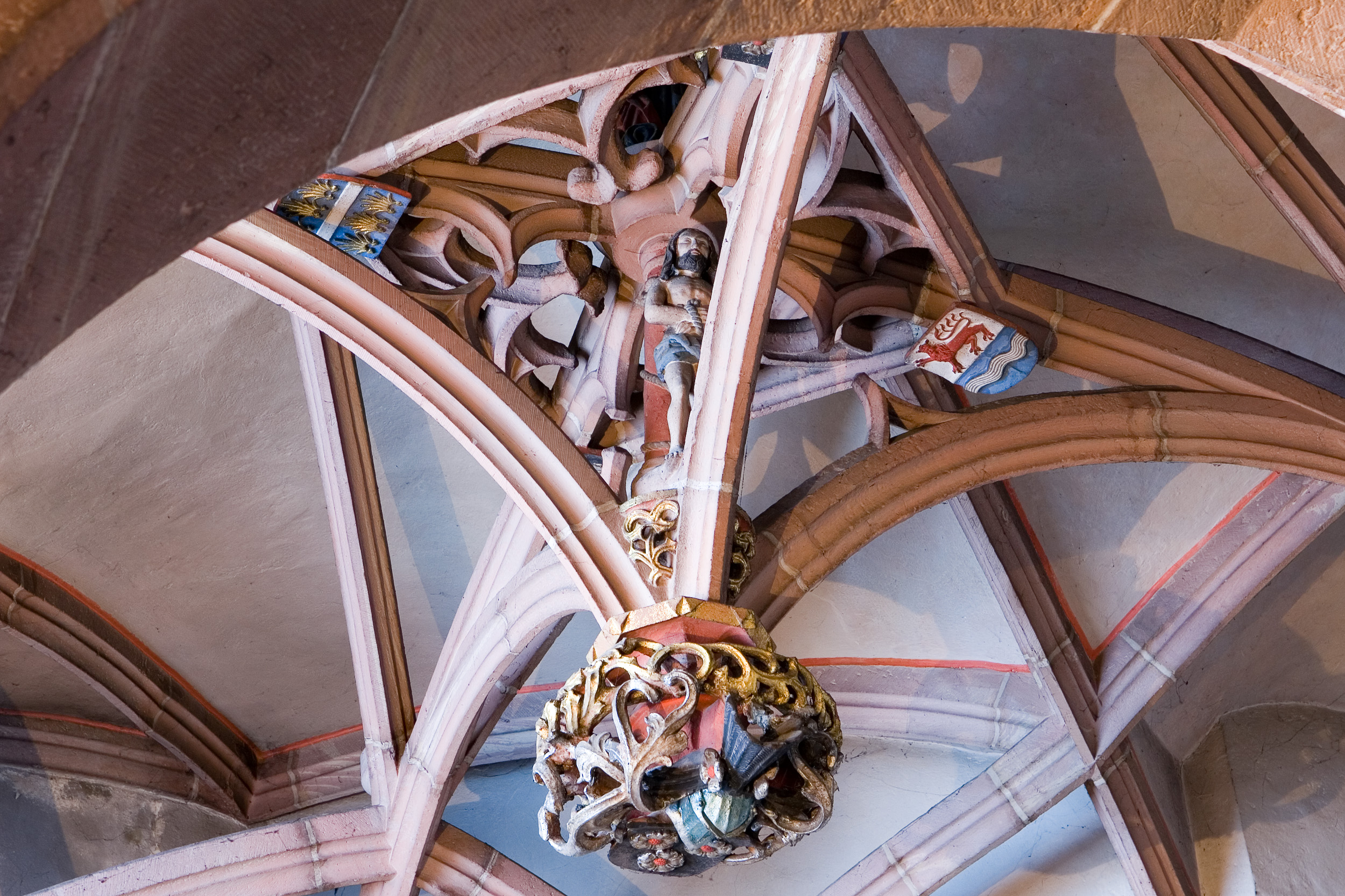 Detail des Hängenden Gewölbes von Hans Baltz von Mertenstein in der Salvatorkapelle des nördlichen Seitenschiffs der Leonhardskirche in Frankfurt am Main. Zu sehen ist Christus an der Geiselsäule, ein darüber thronender Gottvater (hier nicht vollständig zu erkennen), und das tropfenförmig herabhängende Wappen der bekannten Frankfurter Familie Holzhausen. Selber fotografiert im März 2008, Doppellizensierung GFDL & CC-BY-SA 2.5.